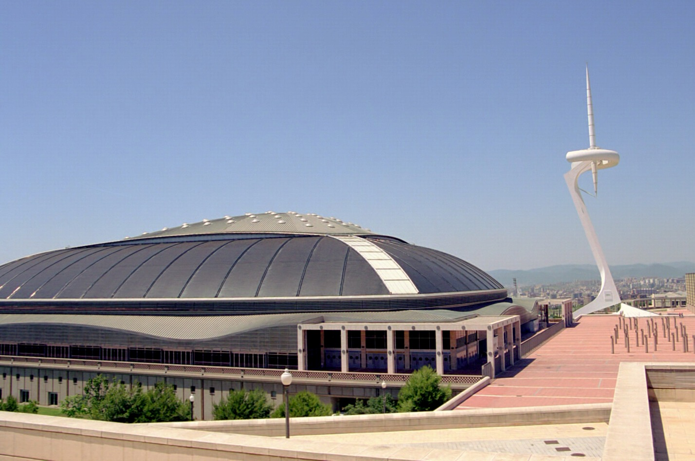 Palau Sant Jordi, Barcelona.